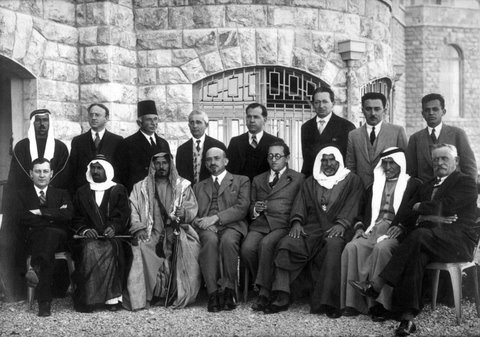 פגישה עם מנהיגים ערבים במלון המלך דוד, ירושלים, 1933